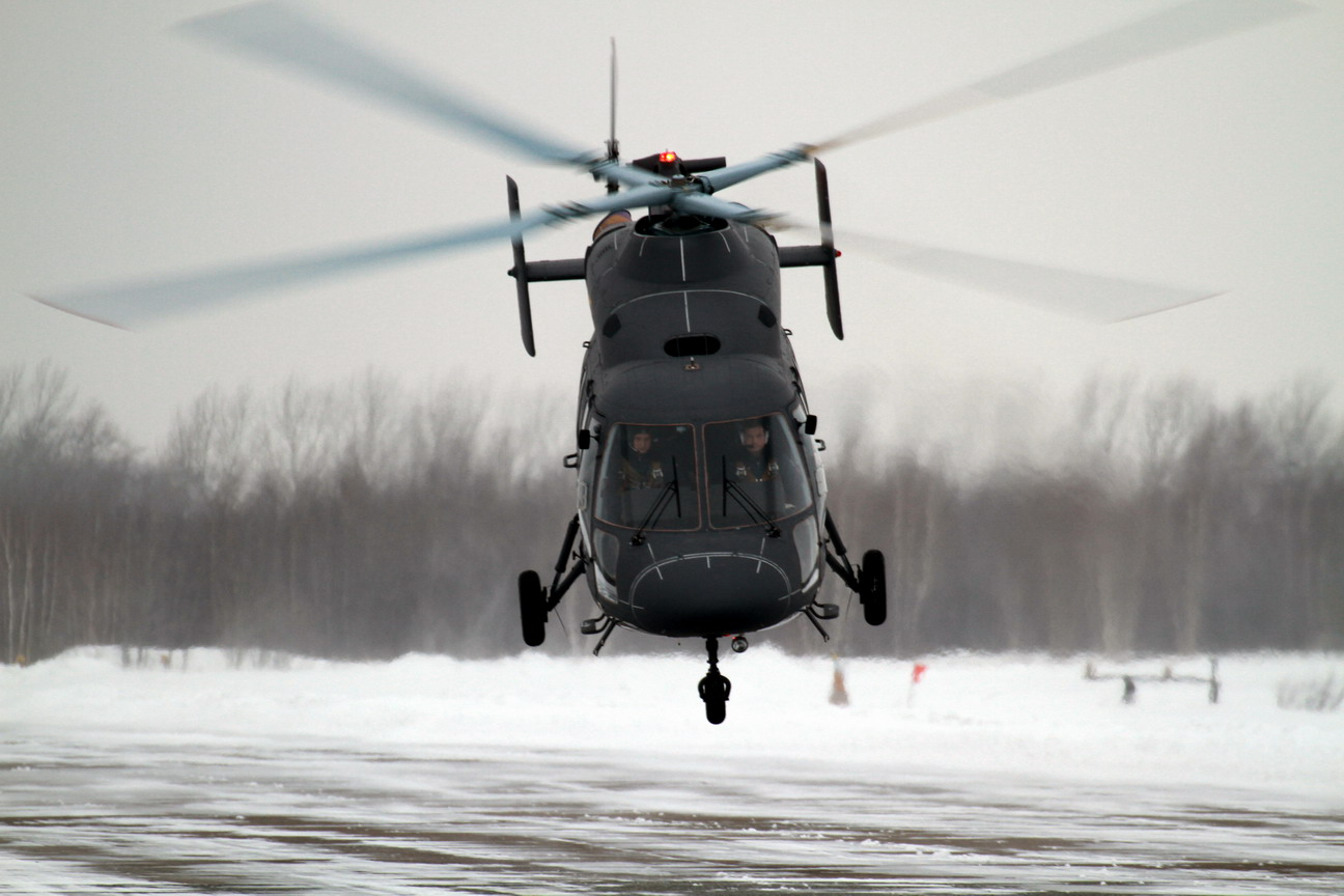 Ансат-У